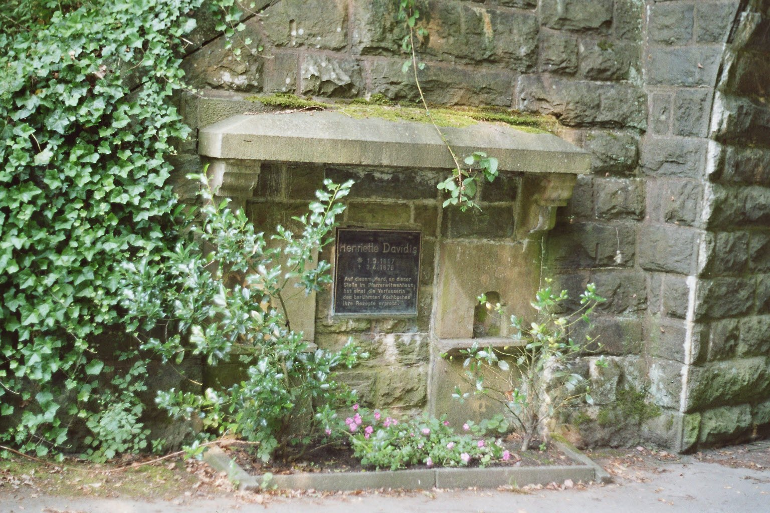 Henriette-Davidis-Denkmal in Wengern an der Brücke der Elbschetalbahn